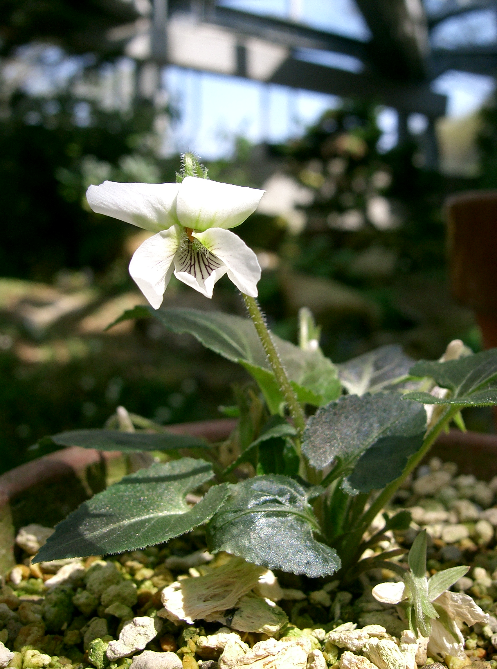 Scientific name Viola yezoensis